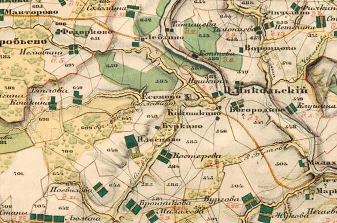 сельцо Есемово (Сеславино) на карте XIX века